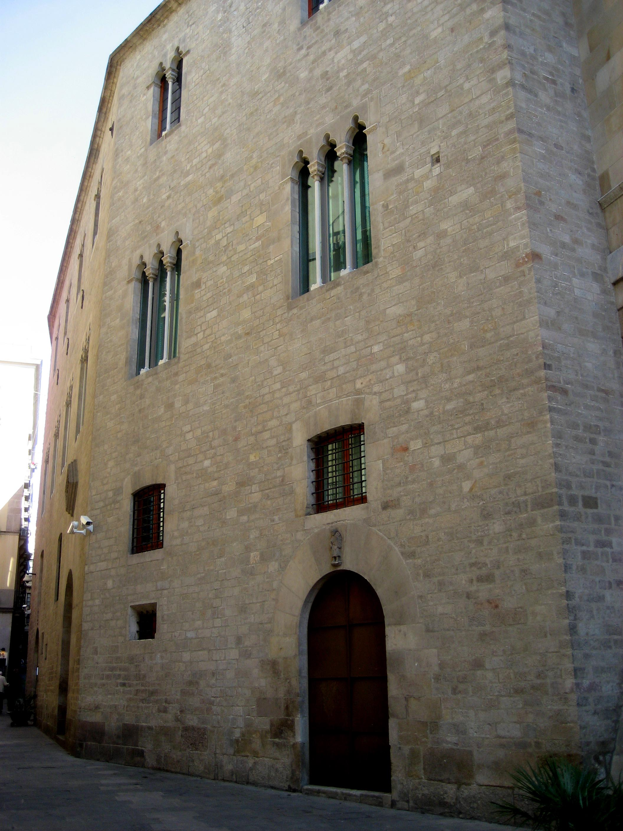 Fachada de la calle San Honorato del Palacio de la Generalidad de Cataluña